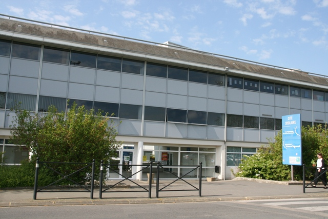 Français